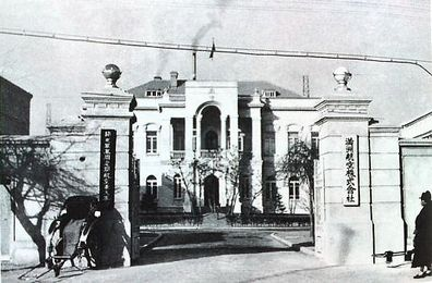 Manchukuo National Airways（满洲航空株式会社）